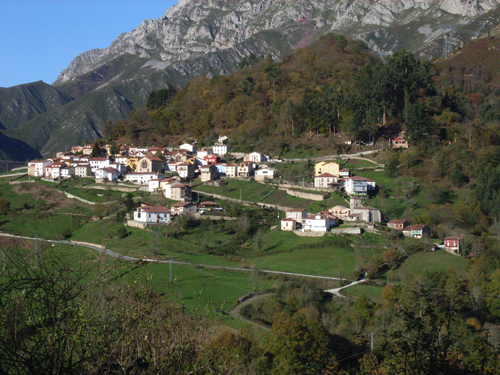 Ruenes dende La Collá